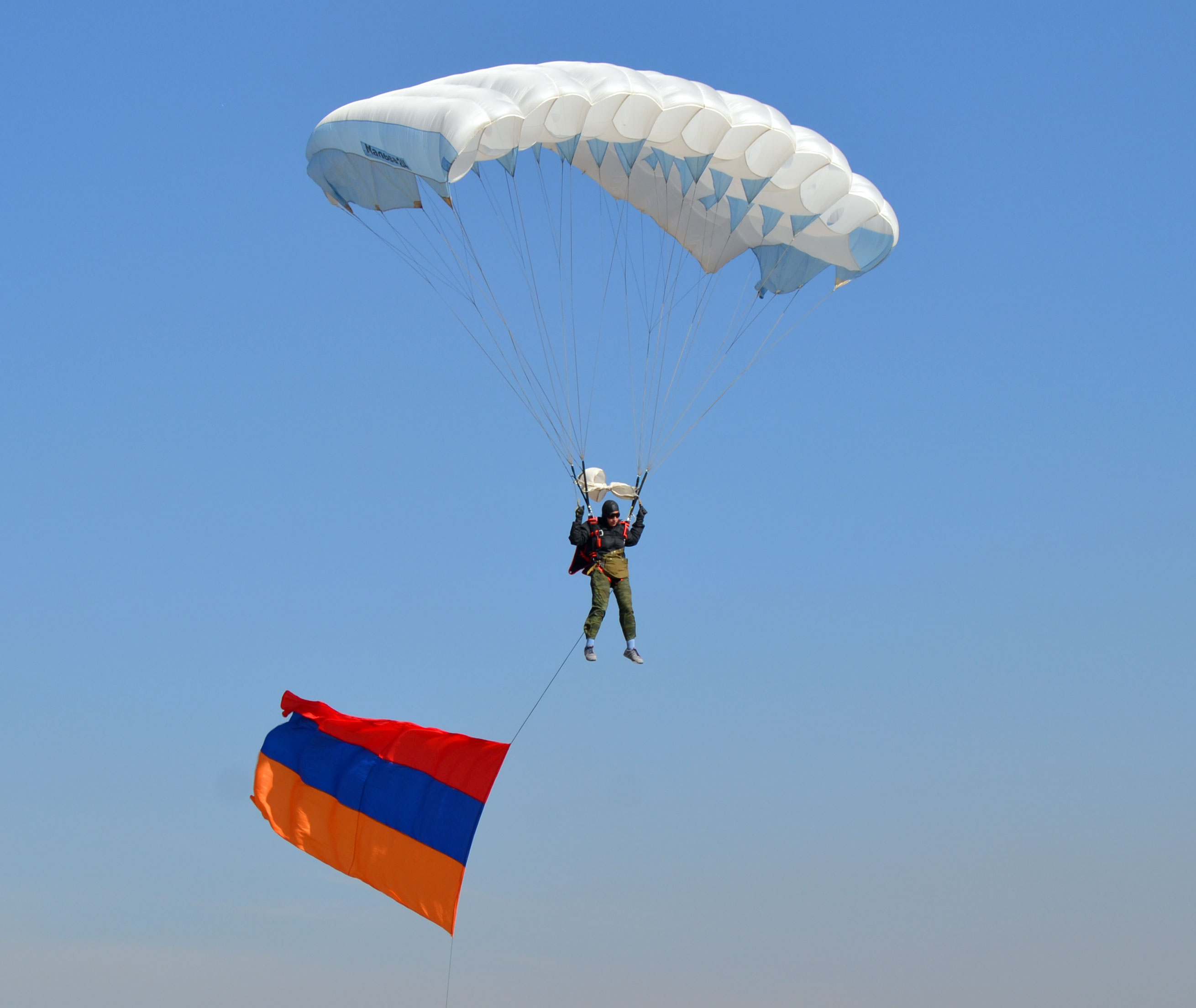 Մալվա-24 պարաշյուտ